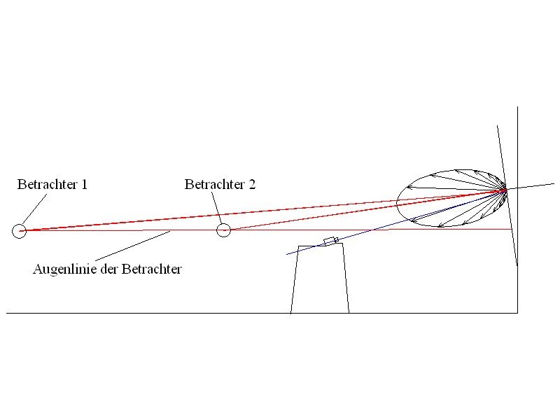 Bildwand geneigt, bessere Verteilung der Leuchtdichte zum Betrachter